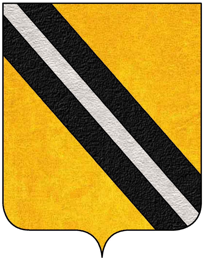 Stemma della famiglia Di Capua